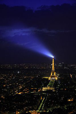 Motiv aus der Kalender-Edition "Paris" von Manfred Zimmermann